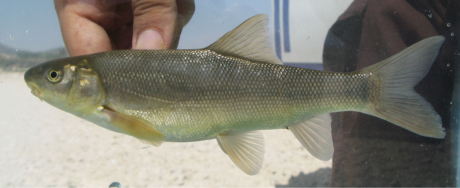 Capoeta coadi sp.n. Río Beshar, Irán. Alwan NH, Zareian H, Esmaeili HR (2016) Capoeta coadi, a new species of cyprinid fish from the Karun River drainage, Iran based on morphological and molecular evidences (Teleostei, Cyprinidae). ZooKeys 572: 155-180.